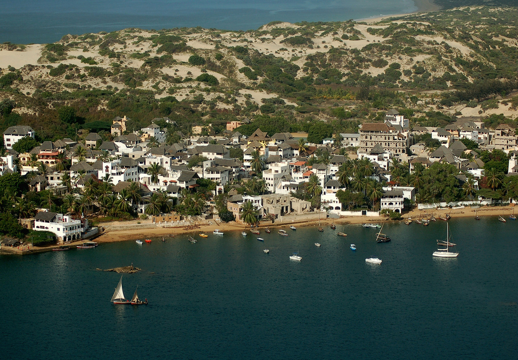 Shella, Lamu Island, Kenya